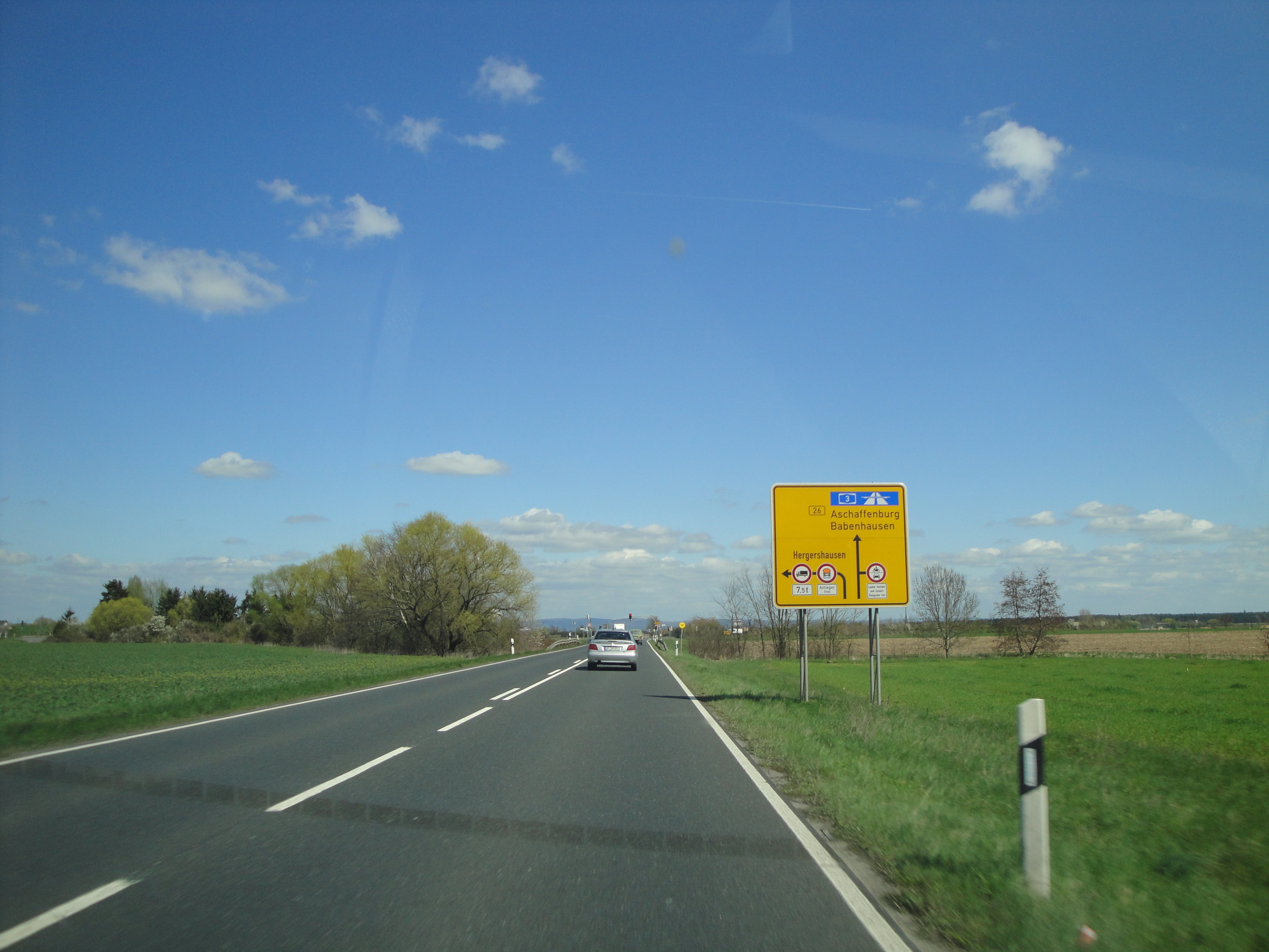 B26 zwischen Dieburg und Aschaffenburg